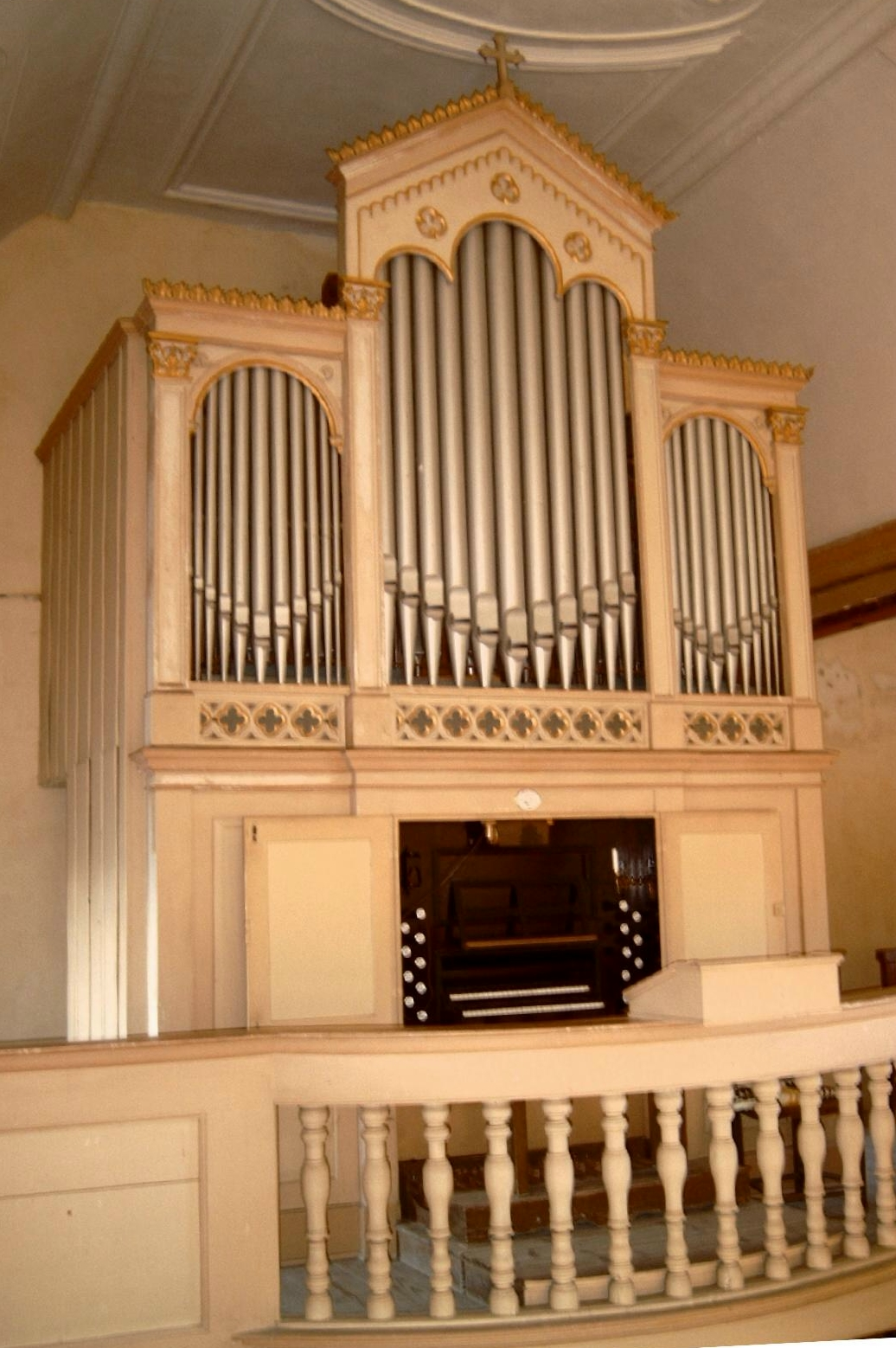 Orgelprospekt, Klosterhäseler